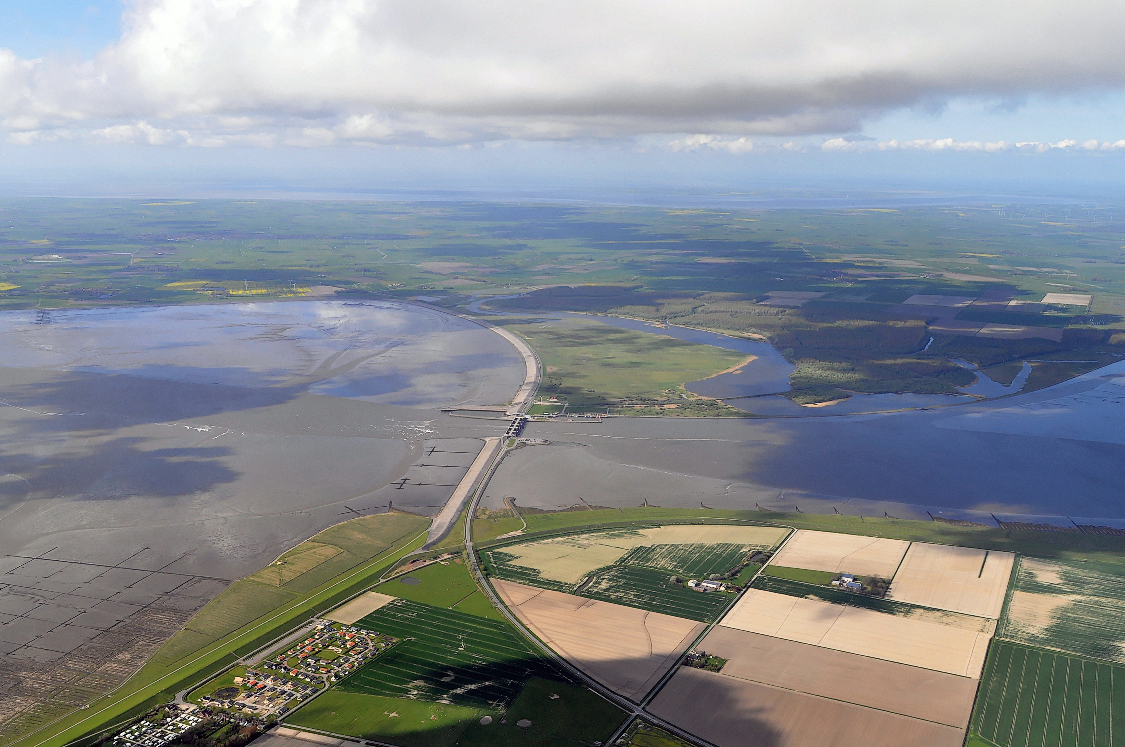 Luftbilder von der Nordseeküste 2012-05: Eidersperrwerk und Umgebung